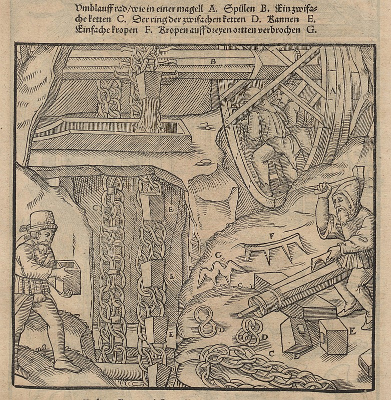 Original image description from the Deutsche Fotothek Bergwerk & Bergbau & Wasserkunst & Spille & Kanne